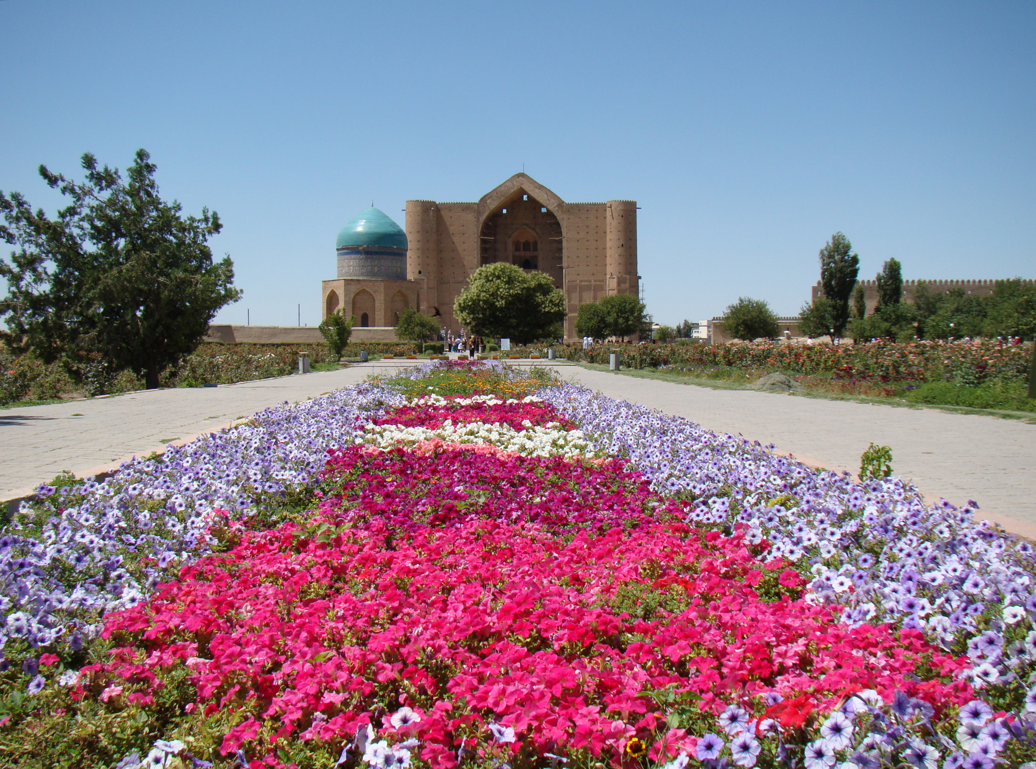 Ханака Ахмеда Ясави. Город Туркестан, Казахстан.